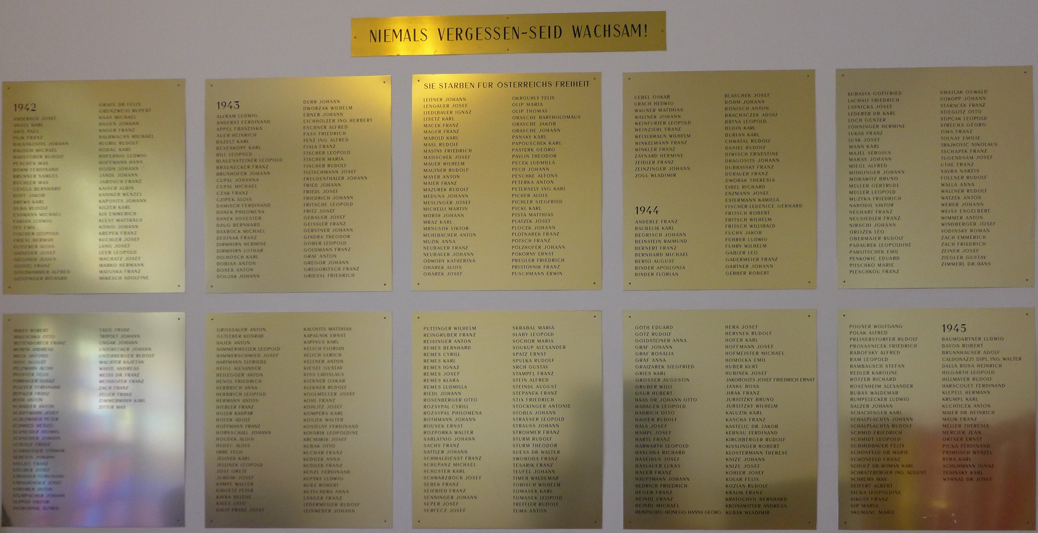 Landesgericht für Strafsachen Wien 2015, Weiheraum, Gedenktafeln für an diesem Ort Hingerichtete